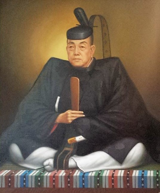 黒田直純の肖像(後世に想像で描かれたもの)。